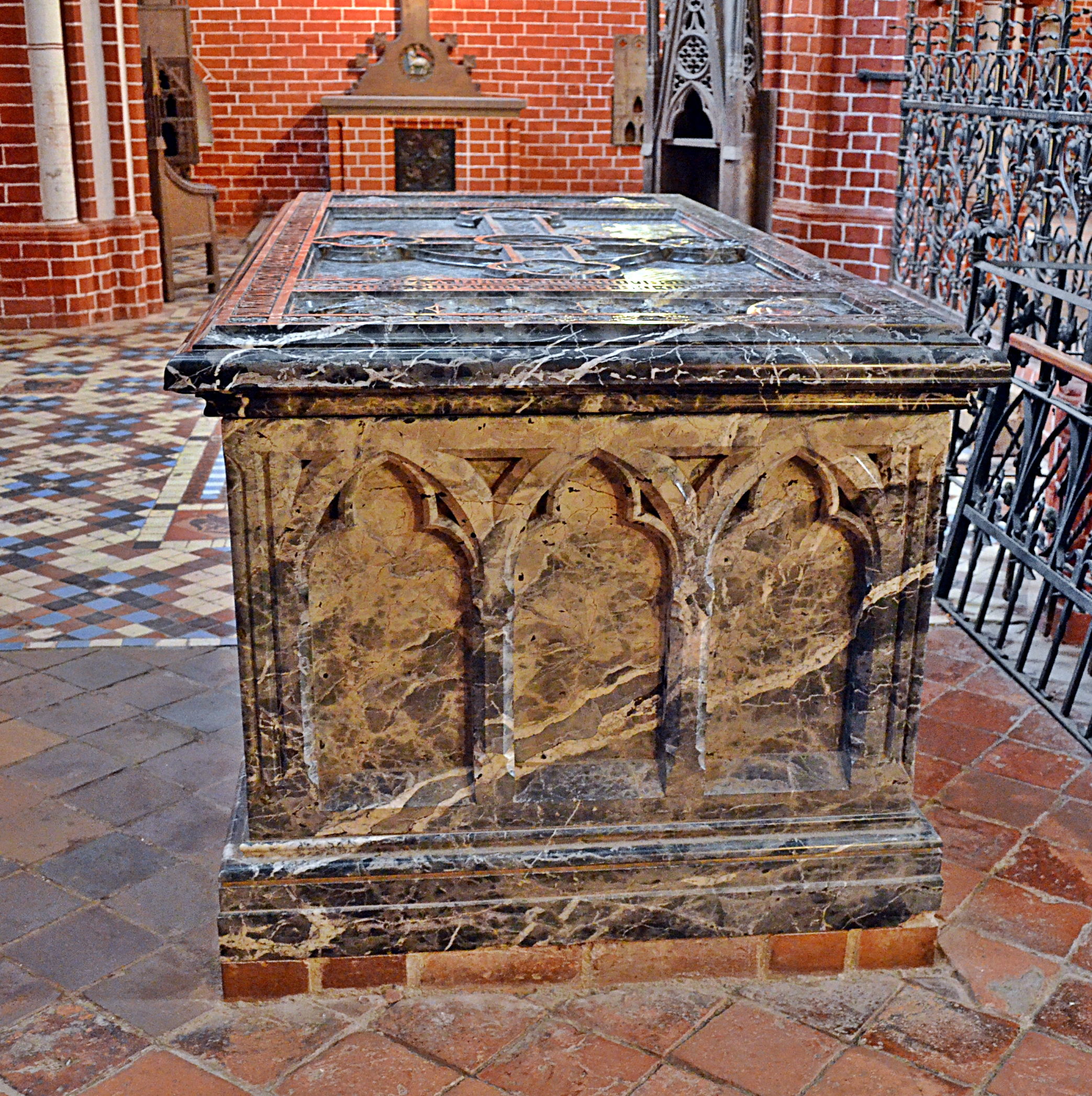 Bad Doberan, Münster, Pribislav Kapelle im nördlichen Querhaus, Sarg 1. S